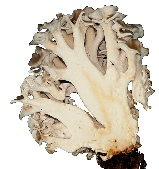 Polyporus umbellatus Bucey_lès-Gy 70700 France